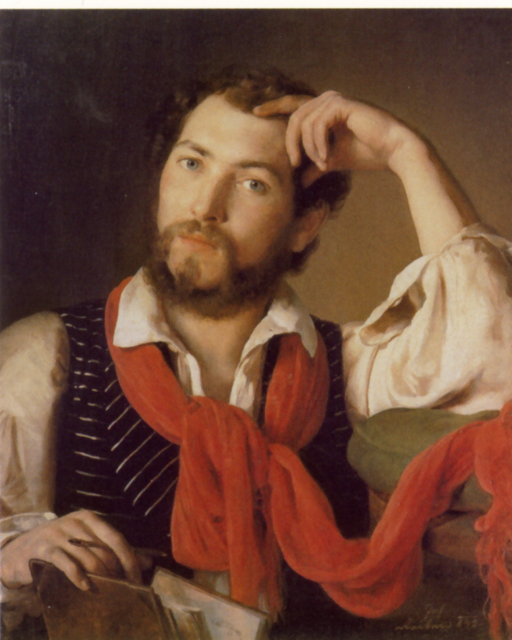 Self-portrait